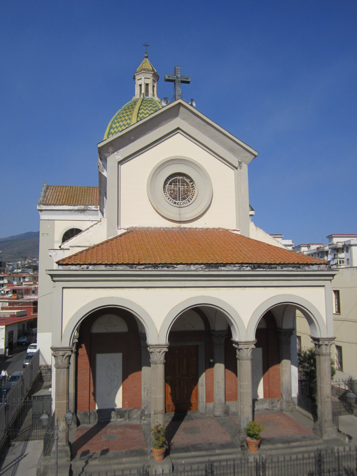 facciata